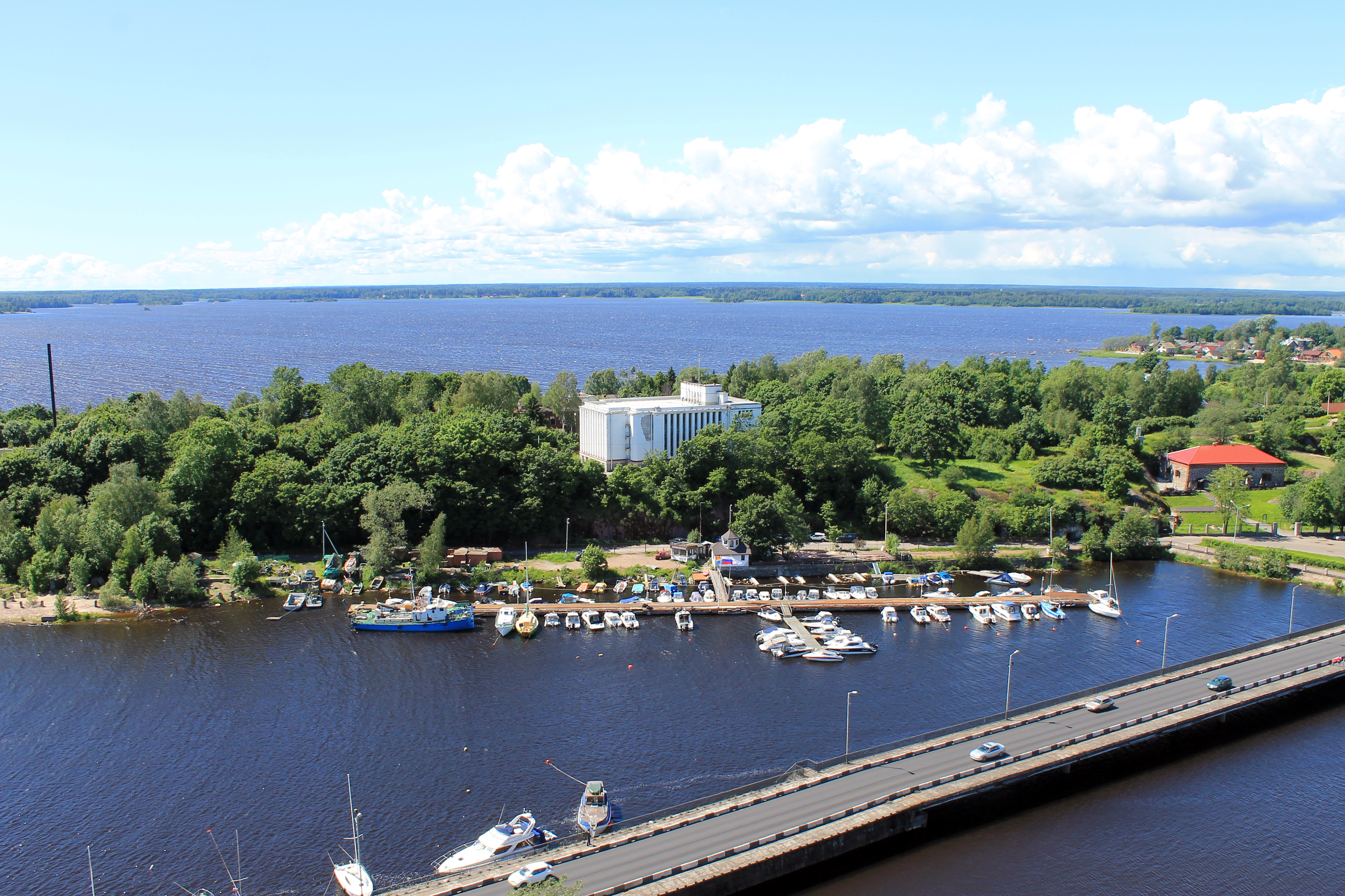 Здание архива (Санкт-Петербург и Лен.область, Выборг, штурма улица, 1)